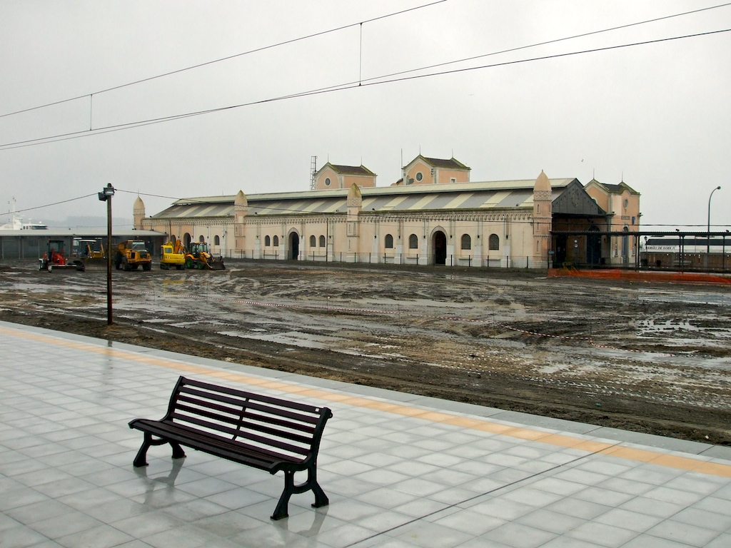 a nova estação, aqui. a antiga, ali. Tipo: EP (Estação) Local: Barreiro [Linha do Alentejo, PK 0,0] Data e hora: 13 de Dezembro de 2008 [13h34]